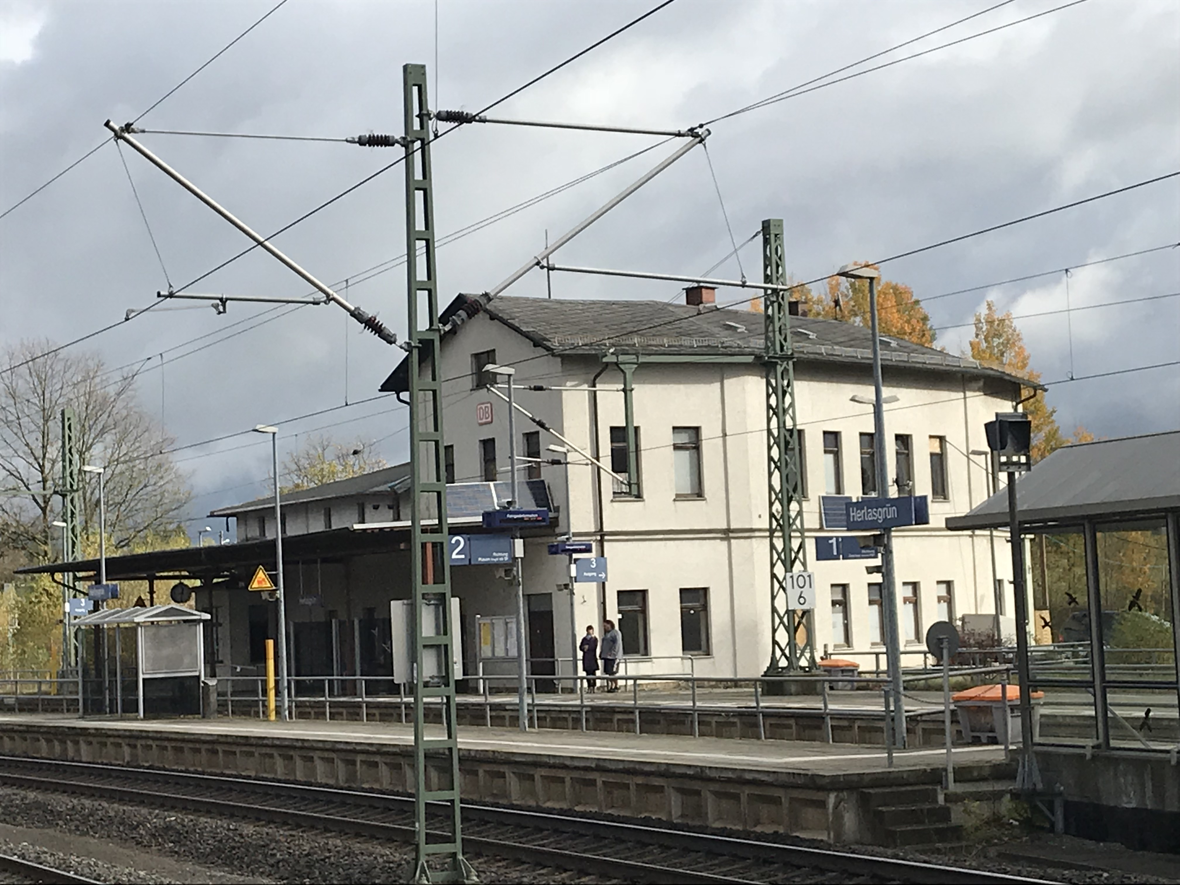 Bahnhof Herlasgrün